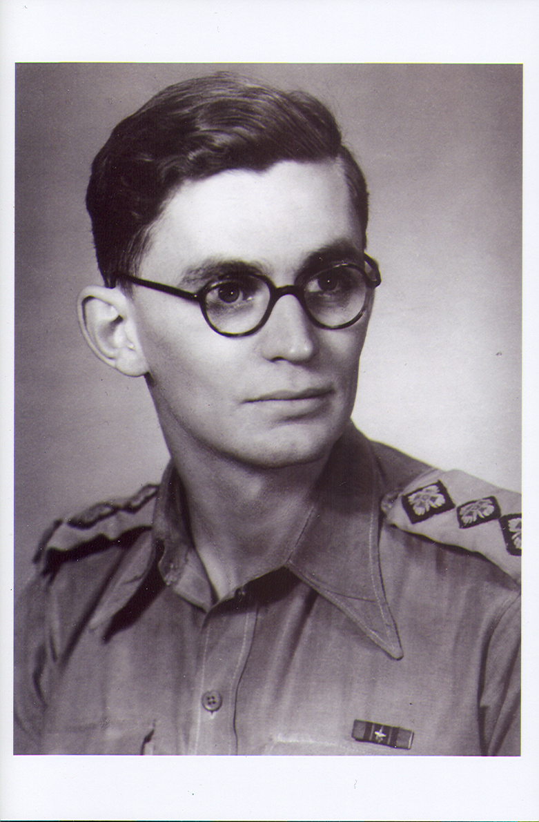 Ralph Beauclerk, dit Capt Casimir, agent secret du SOE, photo officielle vers 1943.